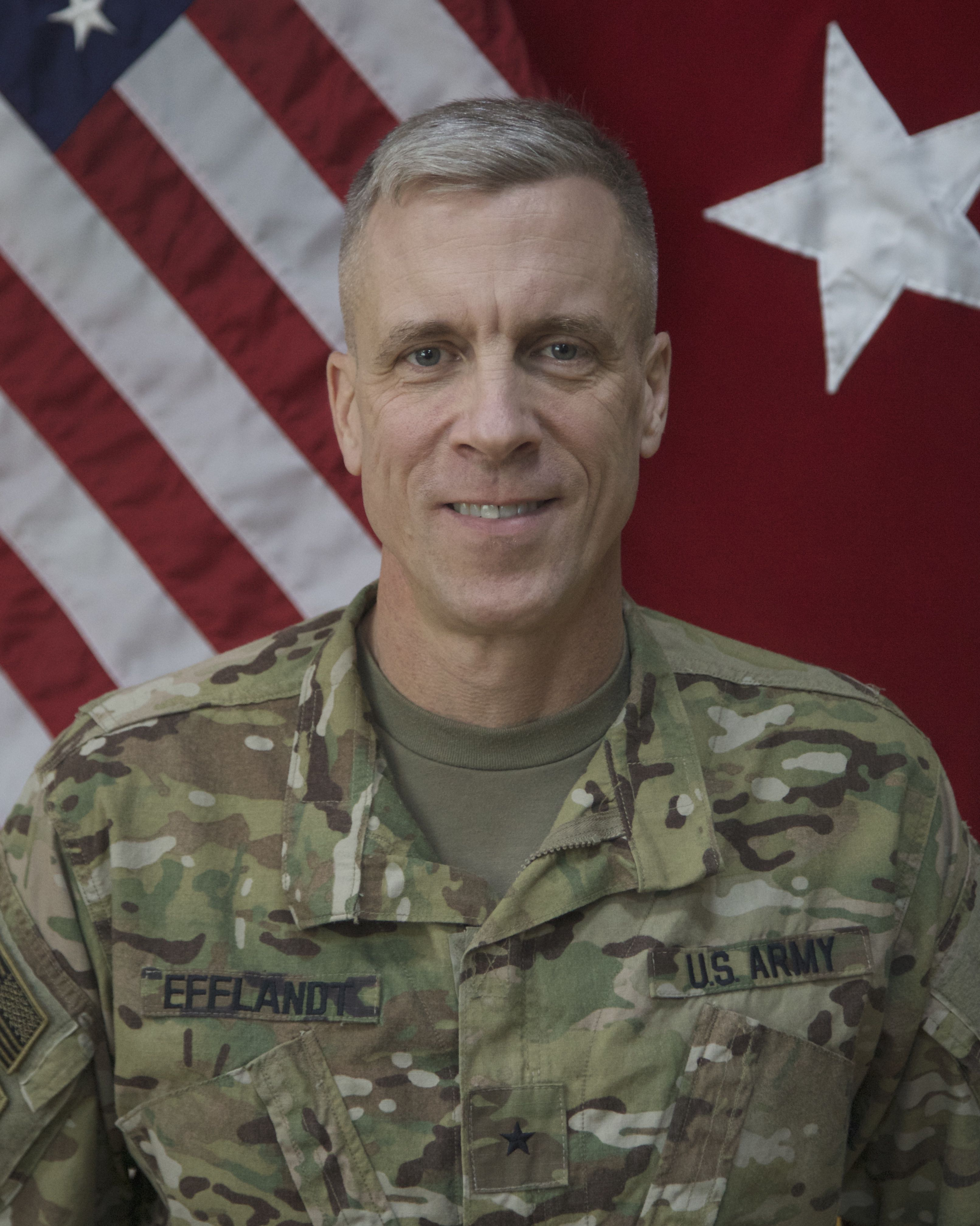 斯科特·埃夫兰德准将，第1步兵师副师长